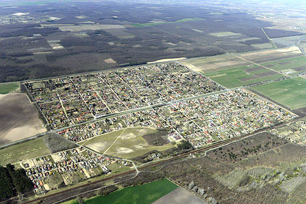 Légi fotó Bocskaikertről